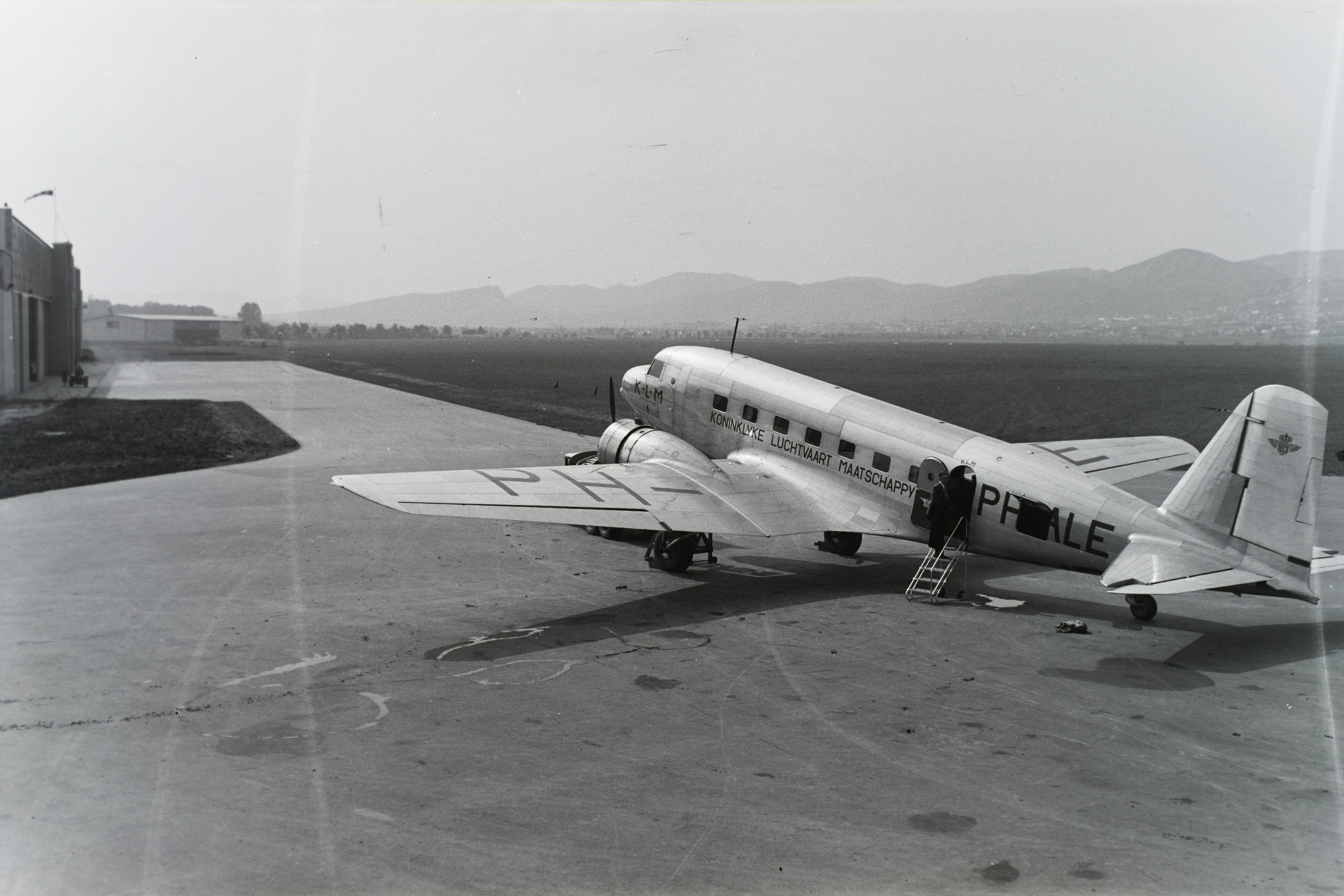 KLM Douglas DC 2 14 üléses, 2x900 LE-s, Wright motoros utasgép, Budaörsön. Leltári jelzet: 29160